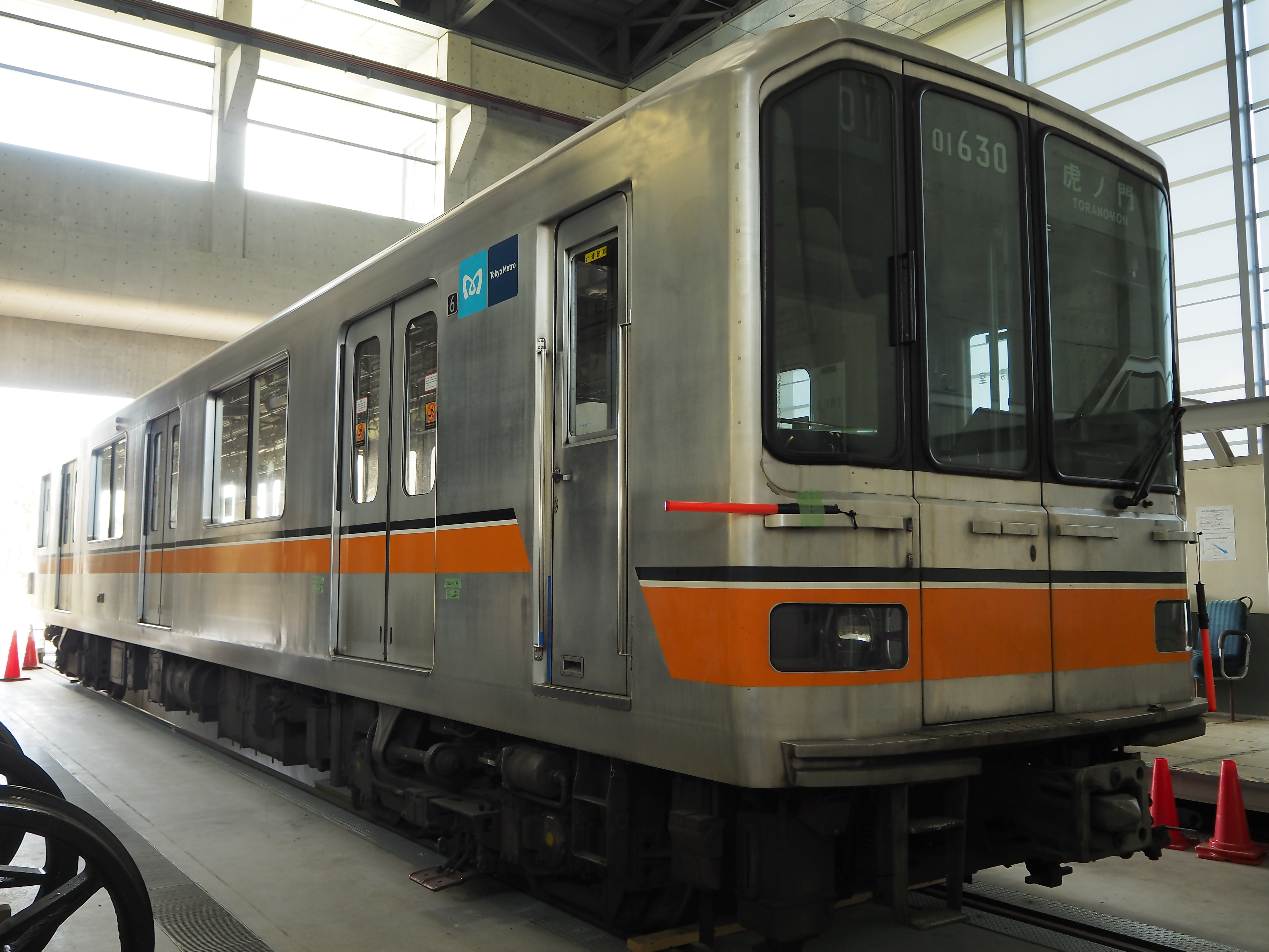 東京大学柏キャンパスで実験用に使われている東京メトロ01系01-630号車